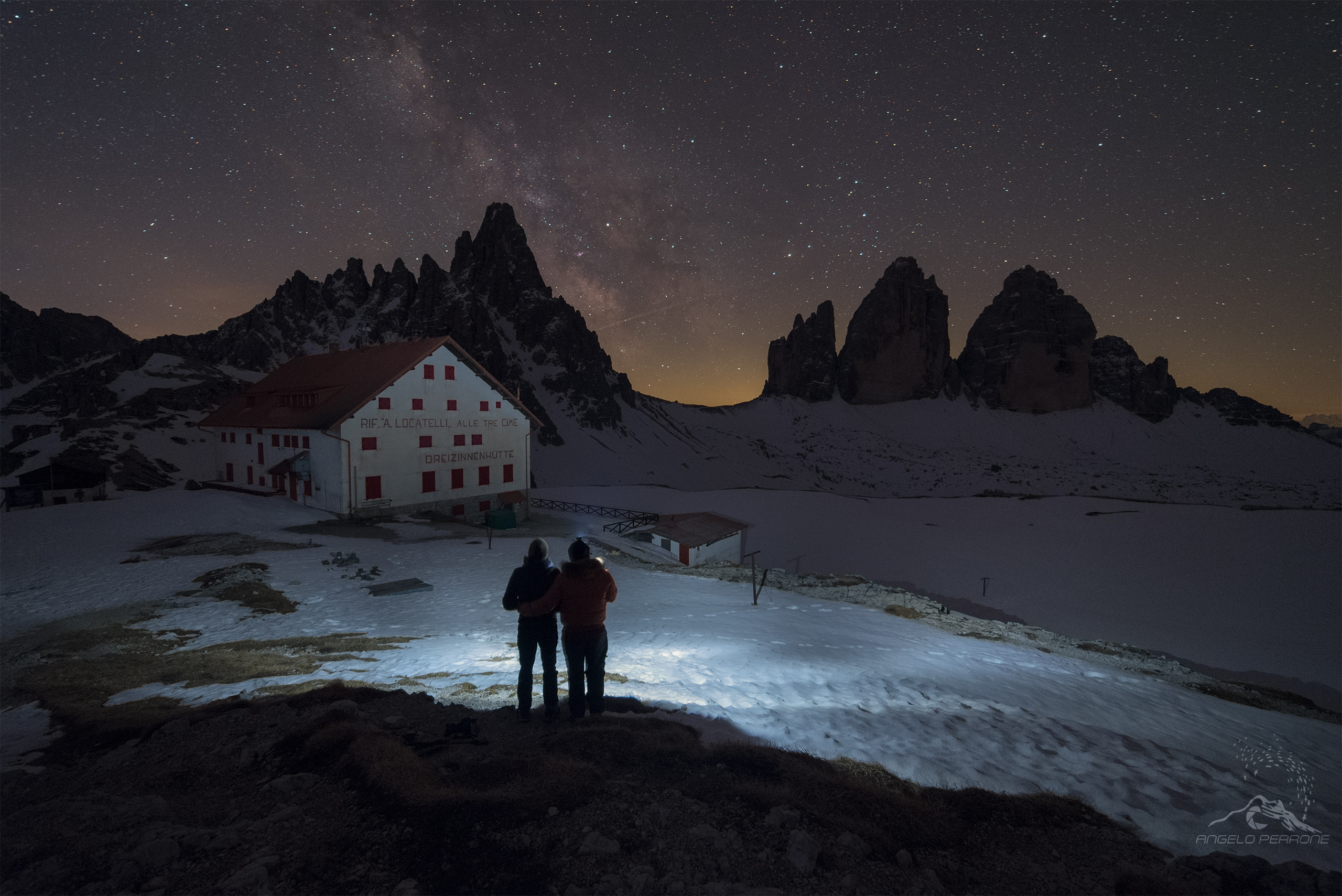 Parco naturale Tre Cime (Q1970453)